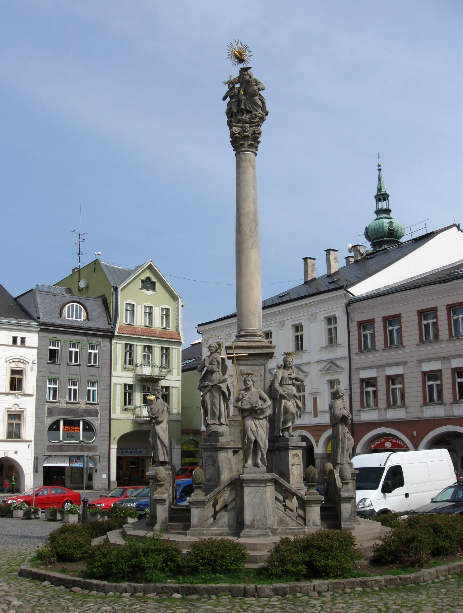 Sloup se sousoším Nejsvětější Trojice (Trutnov), Krakonošovo nám., Trutnov